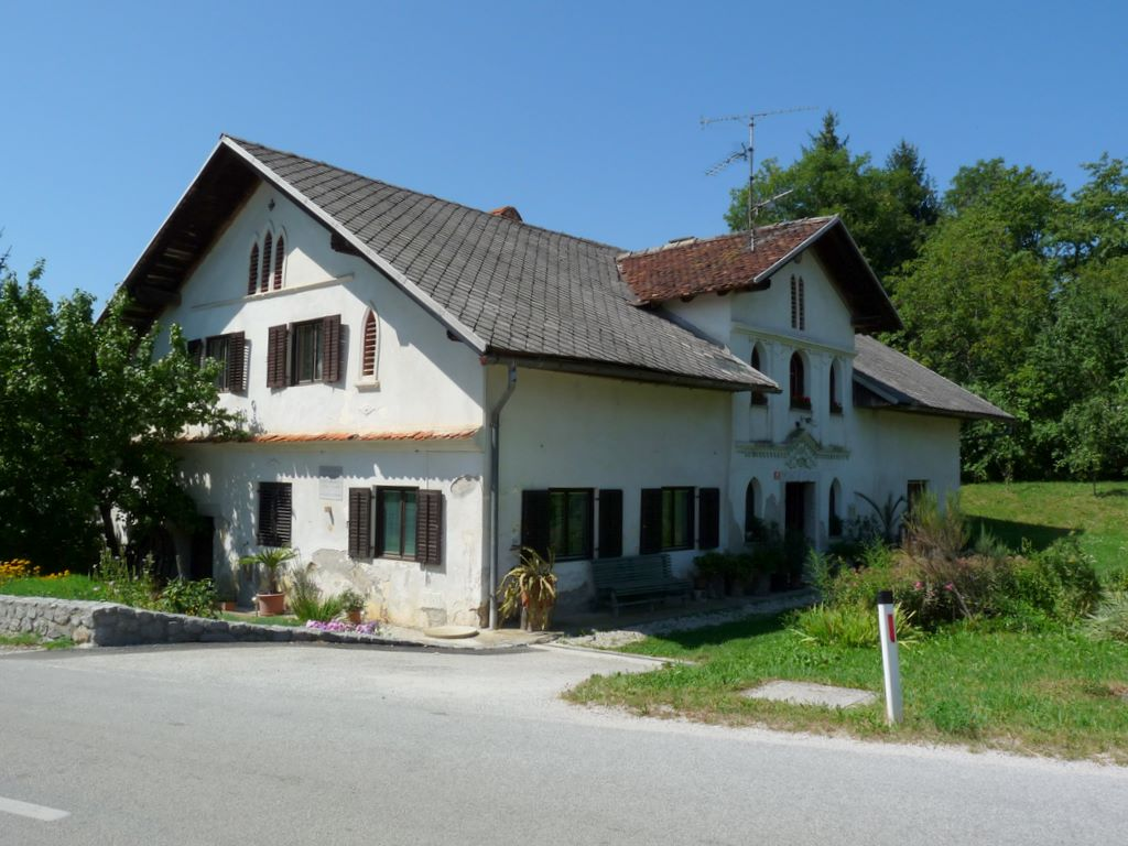 Kračmanova domačija na Beli